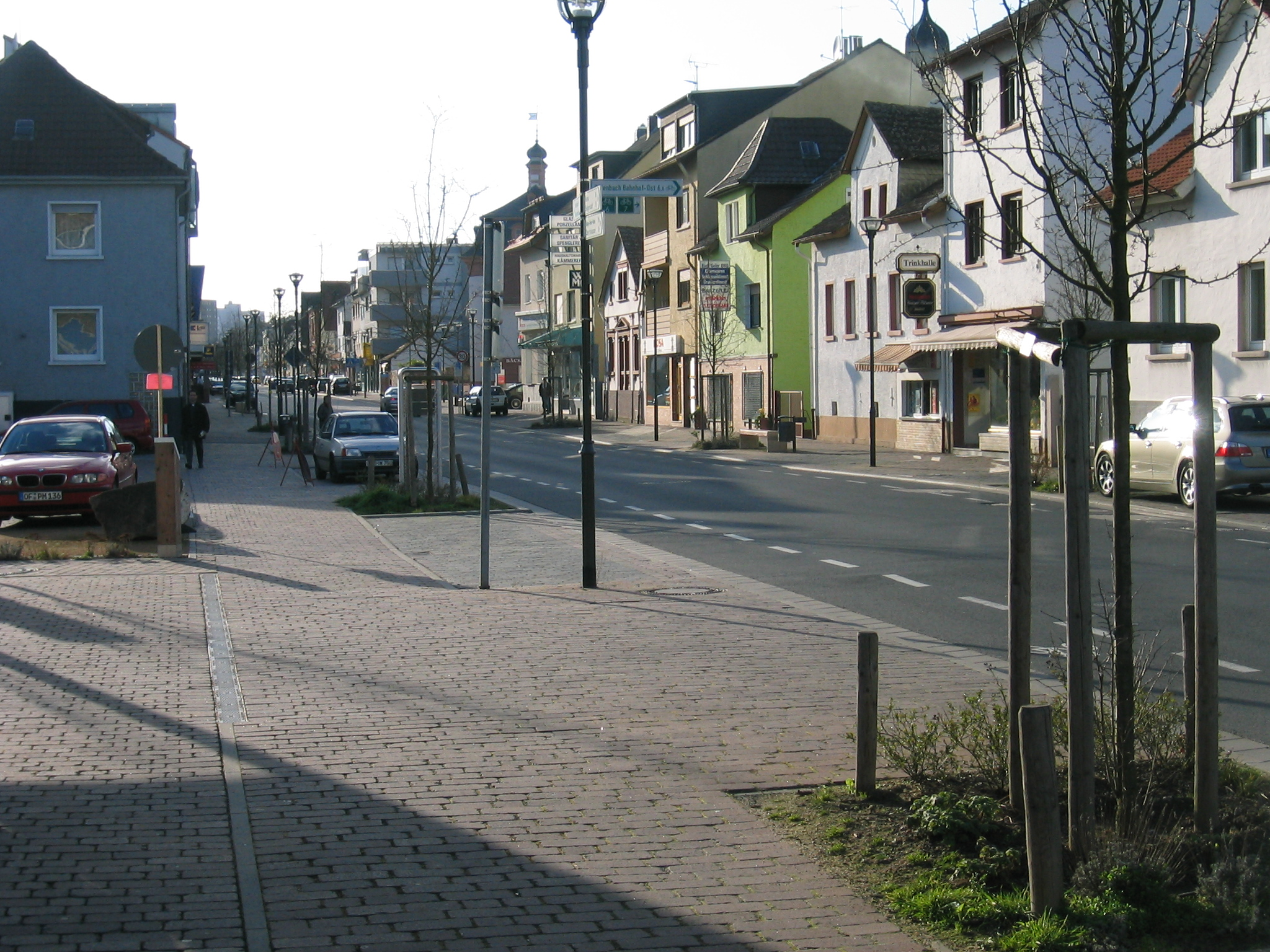 Heusenstamm, Haupteinkaufsstraße: Frankfurter Straße Webseite